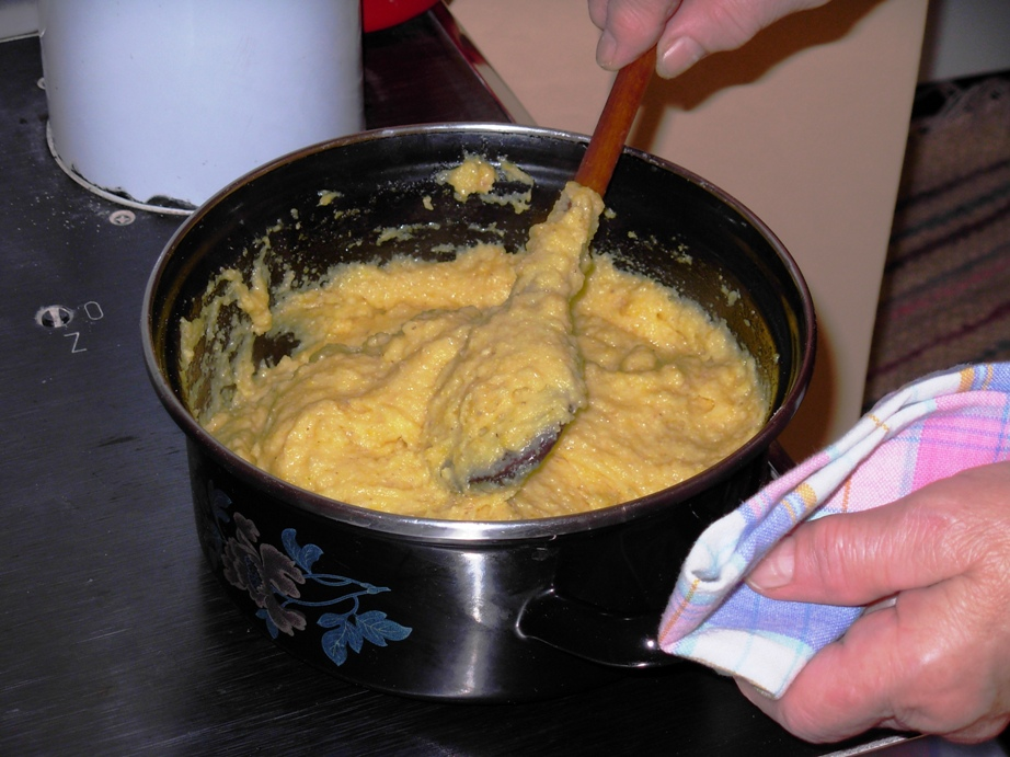 Priprema cicvare za pravoslavni Božić 2011. godine.